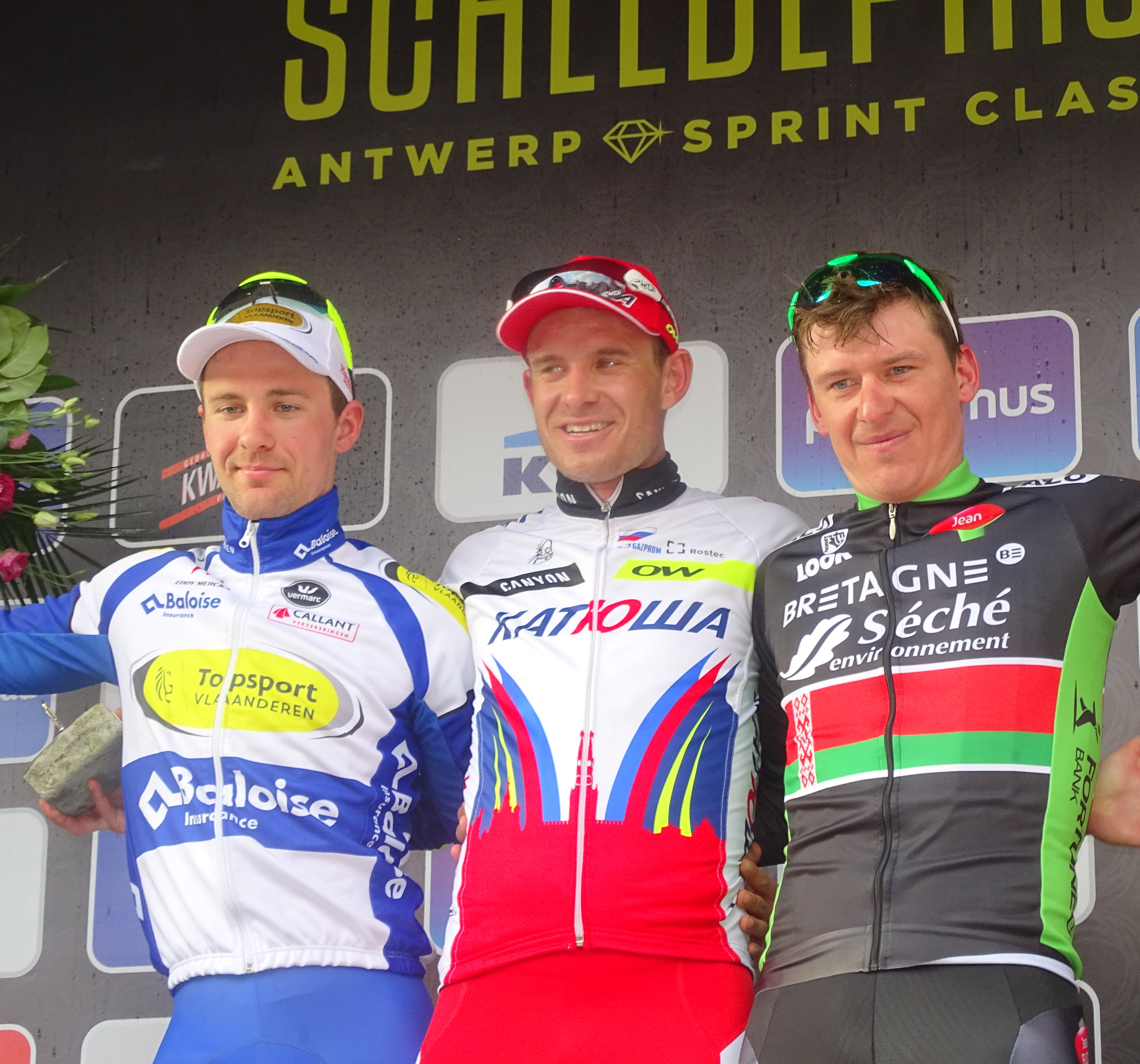 Reportage réalisé le mercredi 8 avril à l'occasion de l'arrivée du Grand Prix de l'Escaut 2015 à Schoten, Belgique.